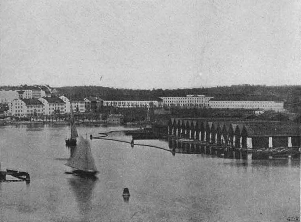 Kaserner tillhörande Andra livgardet samt Livgardet till häst (till vänster resp. centralt), Stockholm. I förgrunden flottans galärskjul på Djurgården